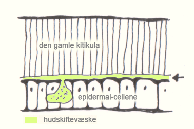 Hudskifte prosessen hos leddyr - NORSK TEKST